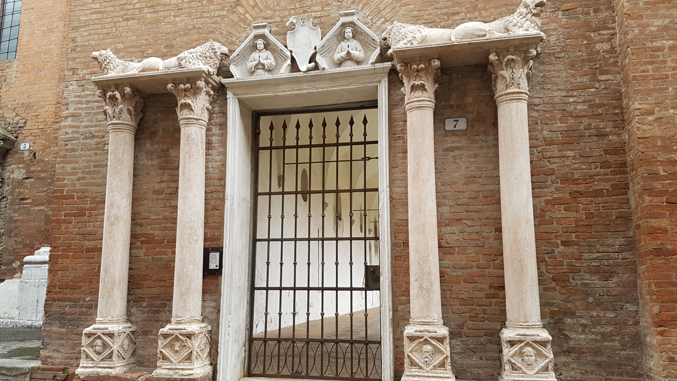 Portale di accesso al chiostro dell'ex convento. Opera del XV sec in stile veneziano